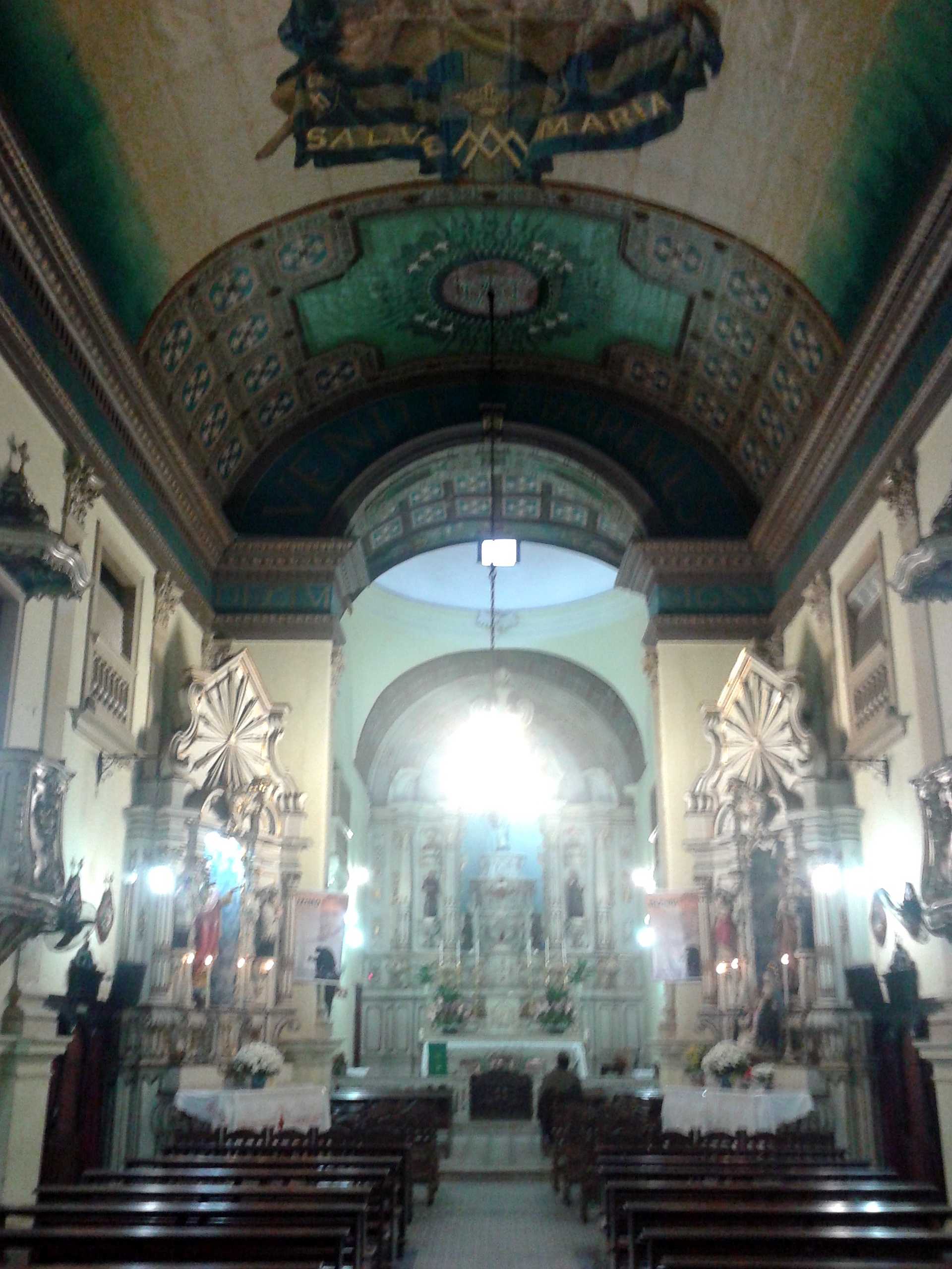 Igreja de São Gonçalo, São Paulo, SP, Brasil.